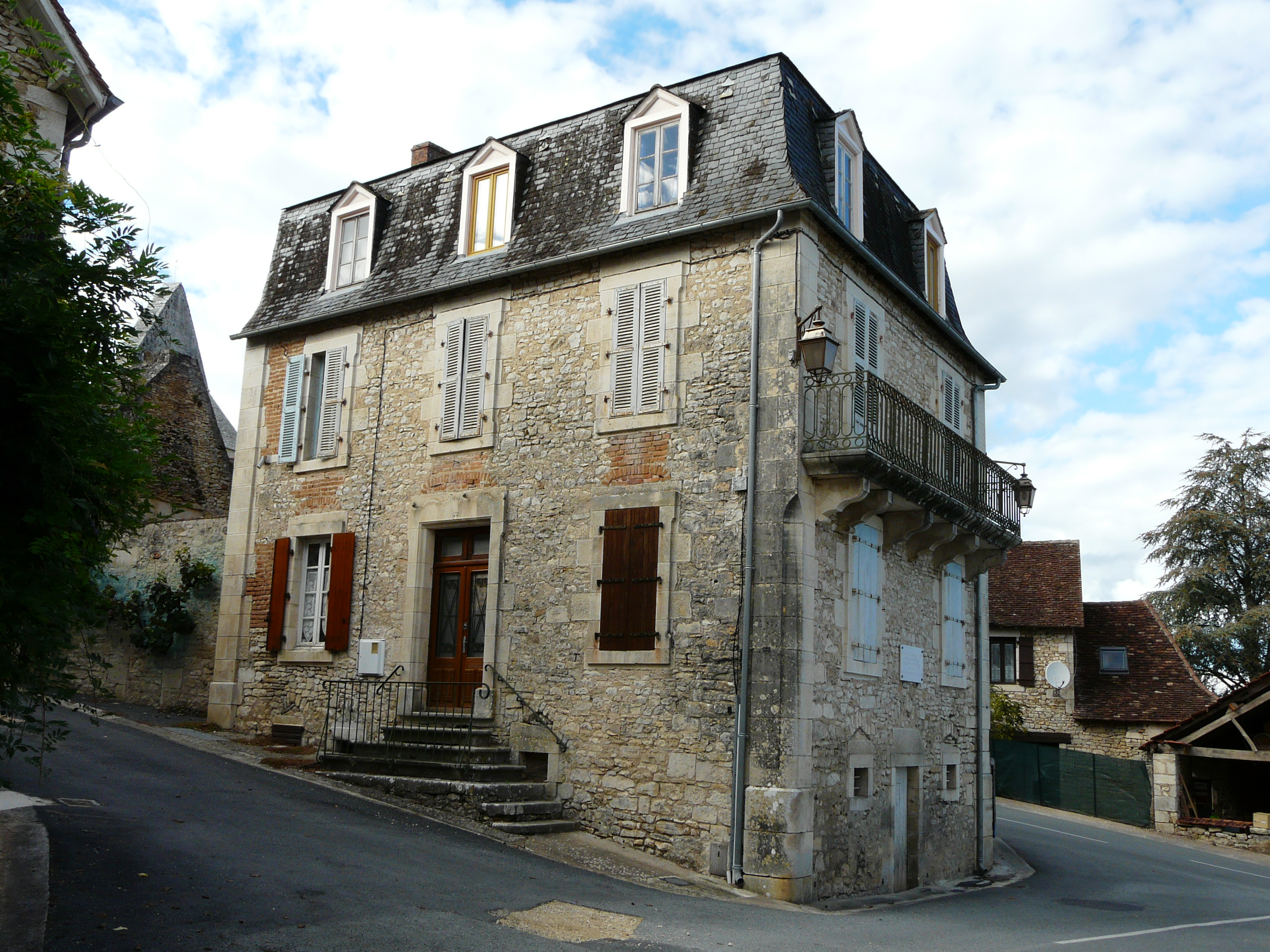 Maison où a vécu Suzanne Lacore, dans le bourg d'Ajat, Dordogne, France.